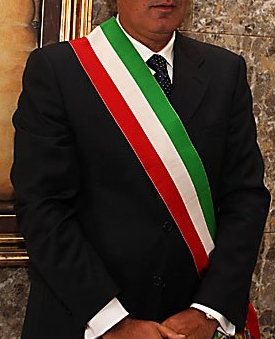 Un sindaco